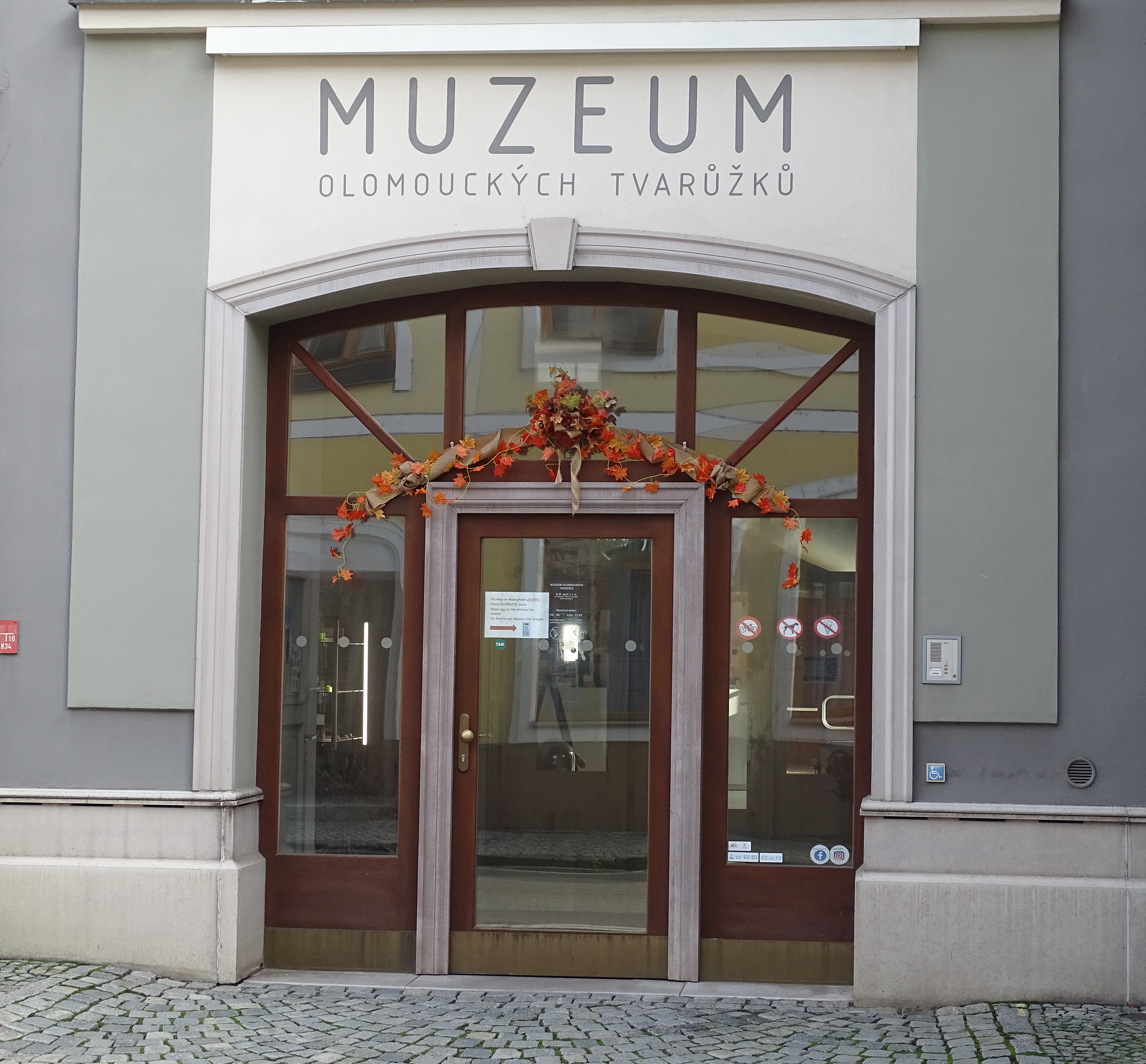 vchod do muzea